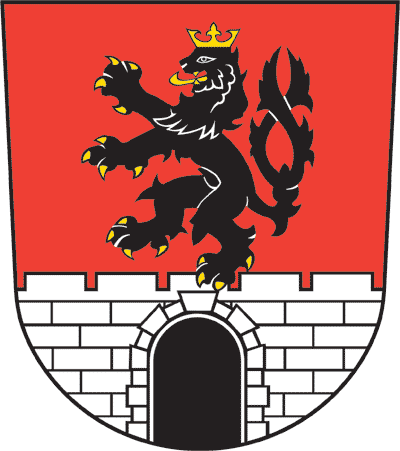 Znak města Rožnov pod Radhoštěm Založeno na existujícím PD souboru